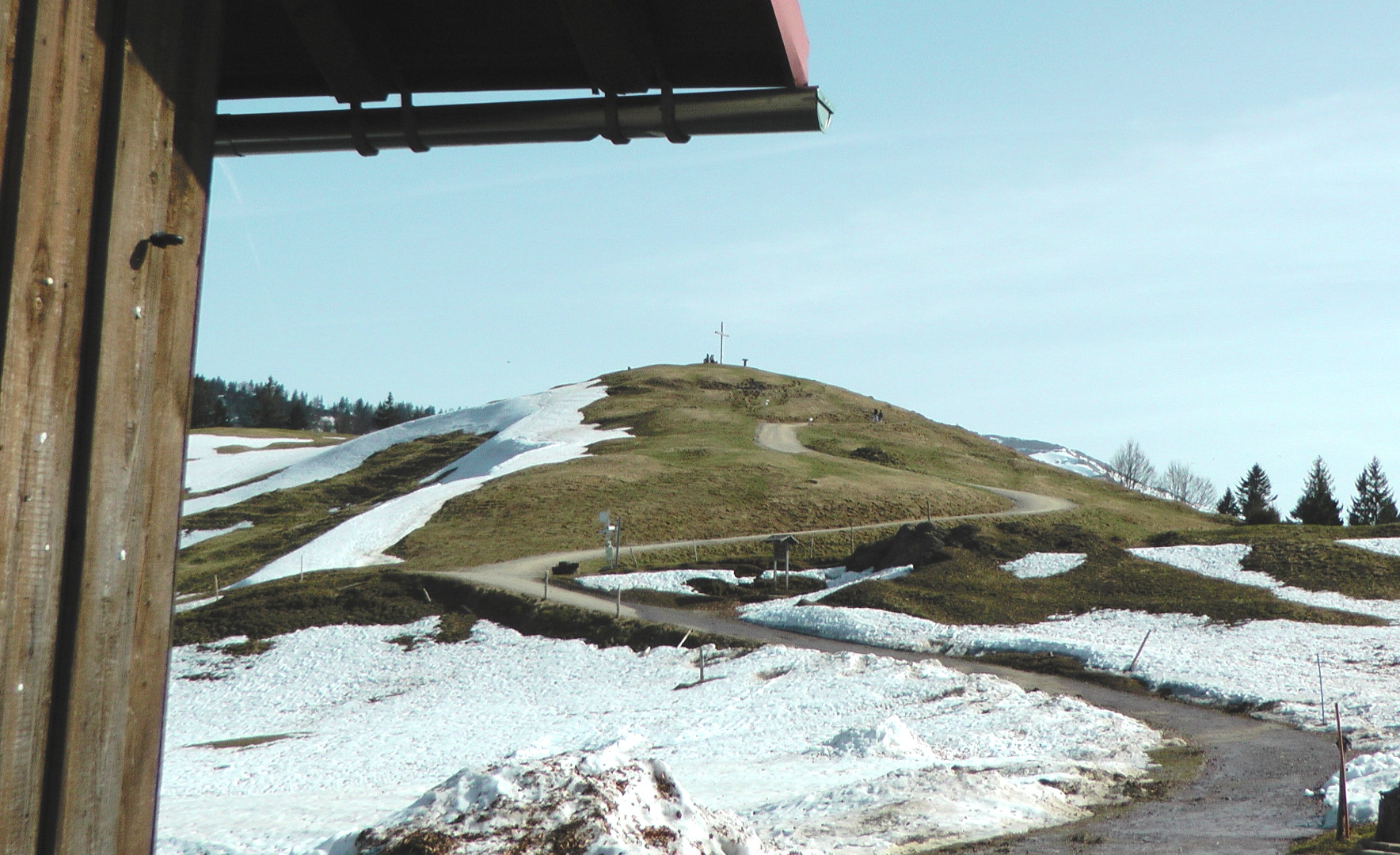 Nordflanke des Hündlekopfs